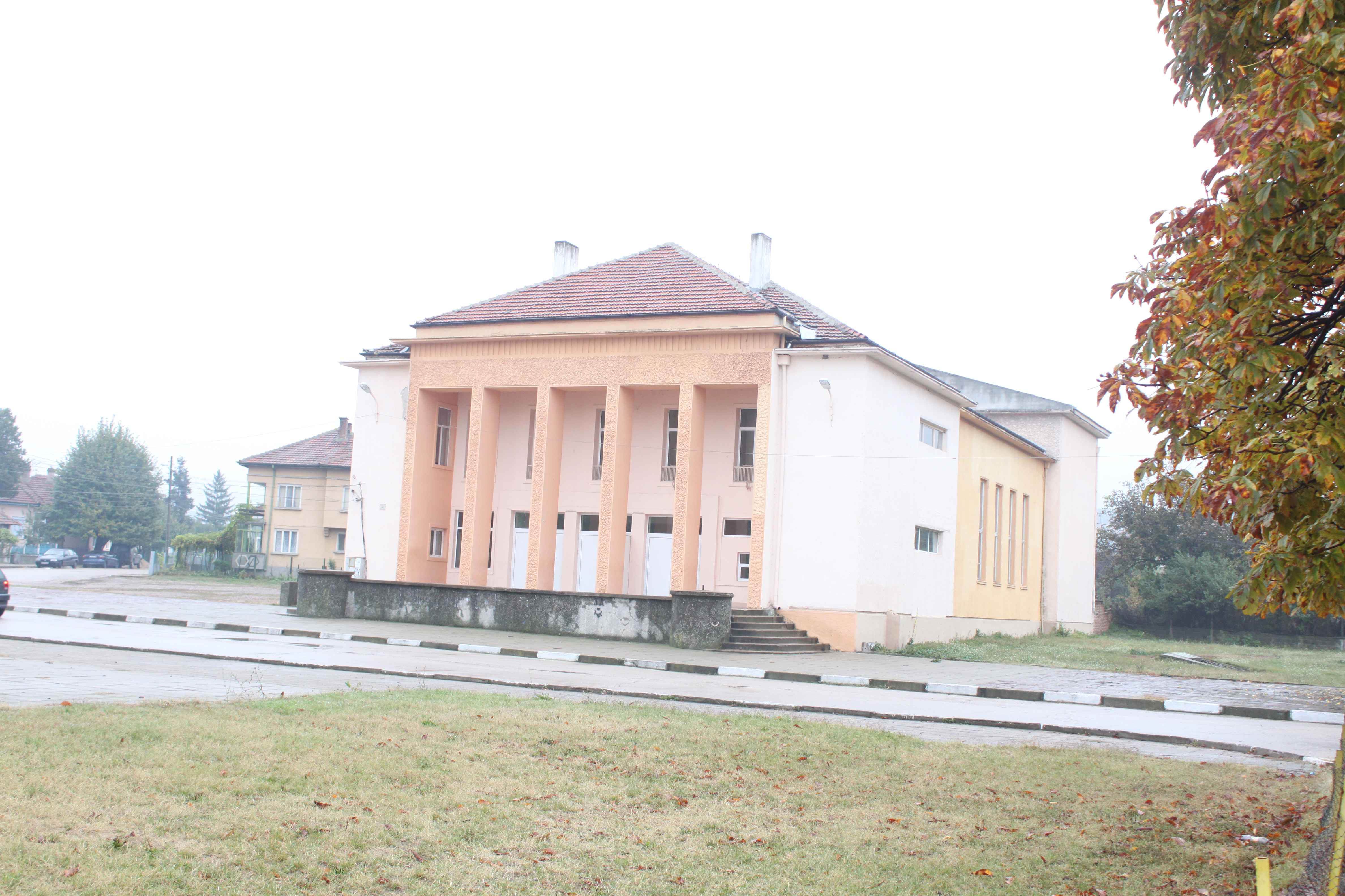 die antike römische Stadt Ratiaria; bei Archar an der Donau - östlich von Widin; das ca. 2 x2 km große Gelände wurde von Schatzsuchern monatelang systematisch mit Baggern umgegraben und druchsiebt, so dass alle archäologischen Schichten und Funde zerstört sind; nur an einer Stelle ist ein gemauerter Bogen übrig geblieben